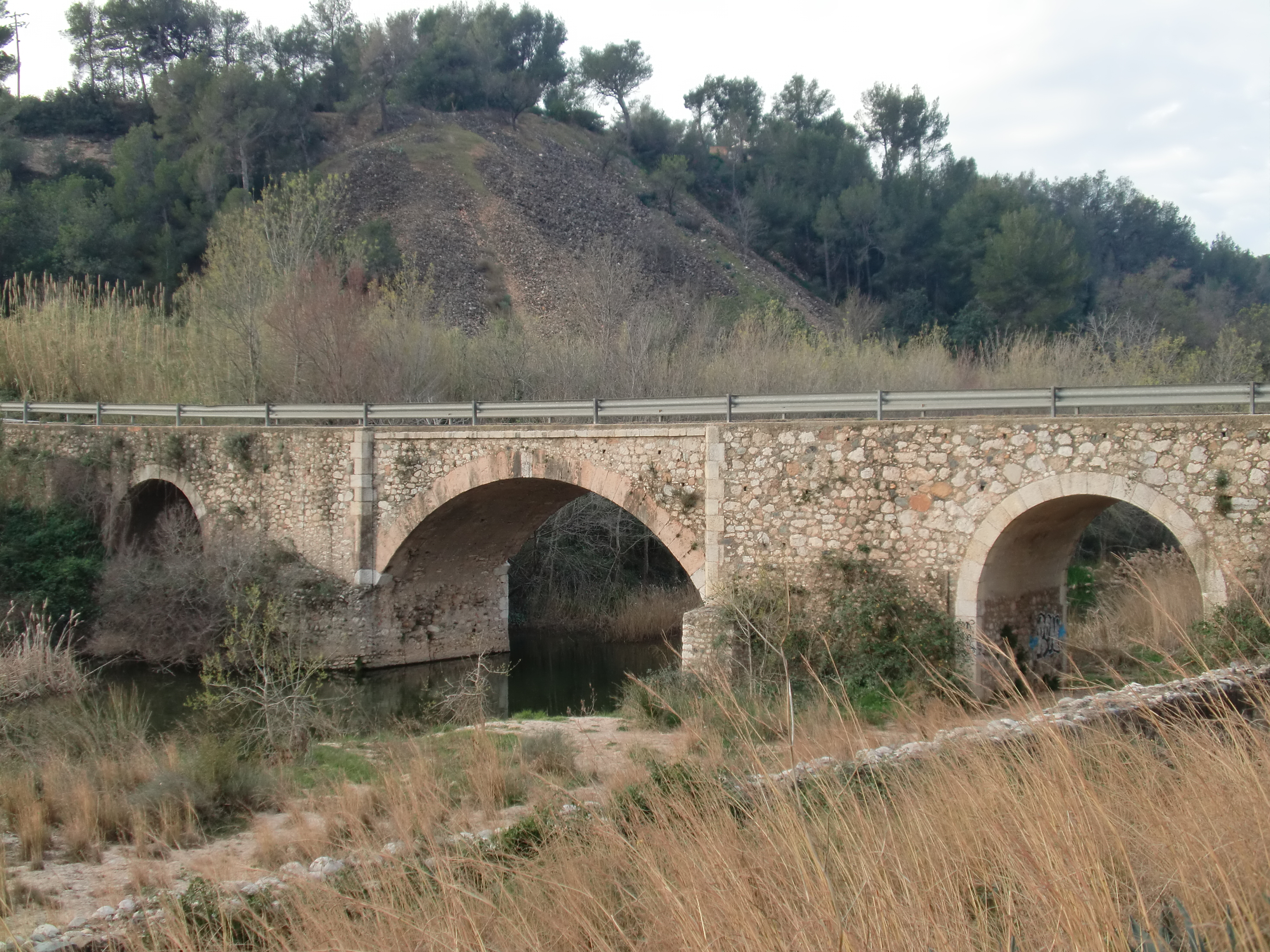 Pont de Goi (Alcover i Valls)